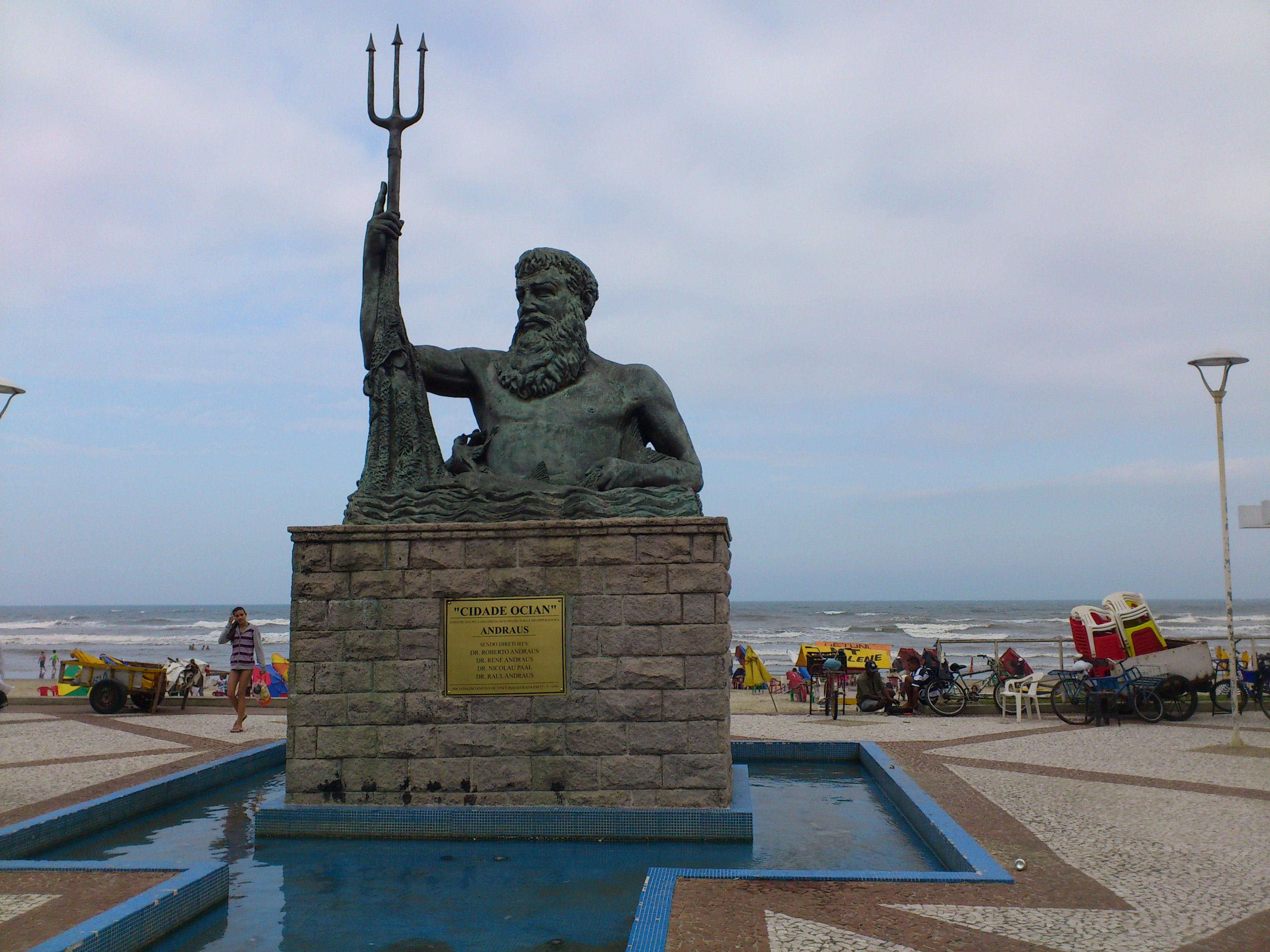 Estátua de Netuno - Cidade Ocian - Praia Grande SP